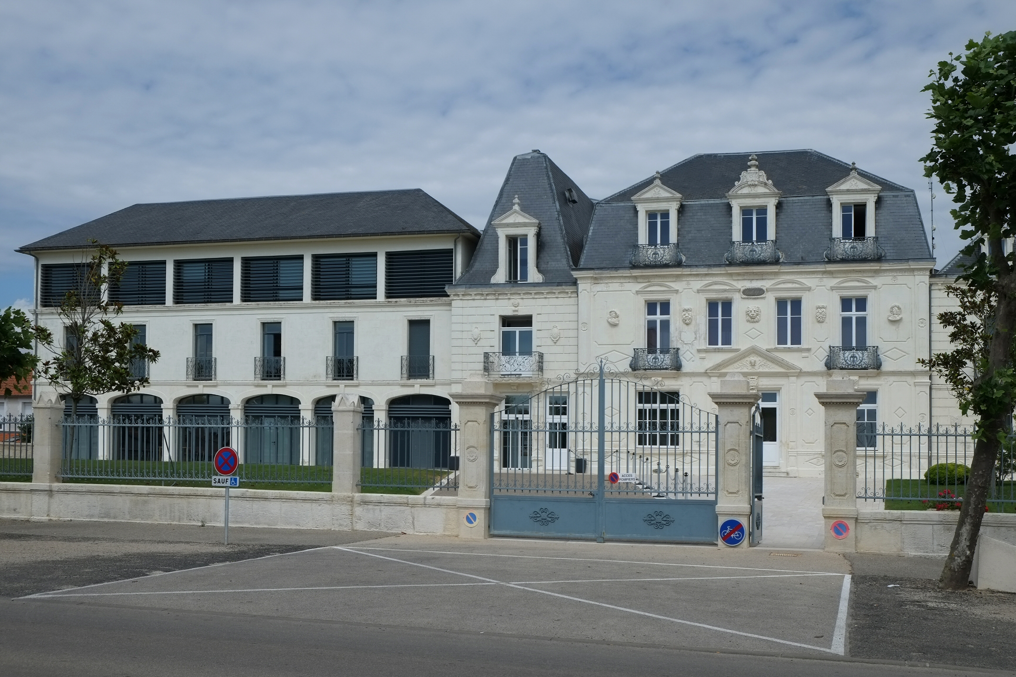 Centre Beauséjour Châtelaillon-Plage Charente-Maritime France